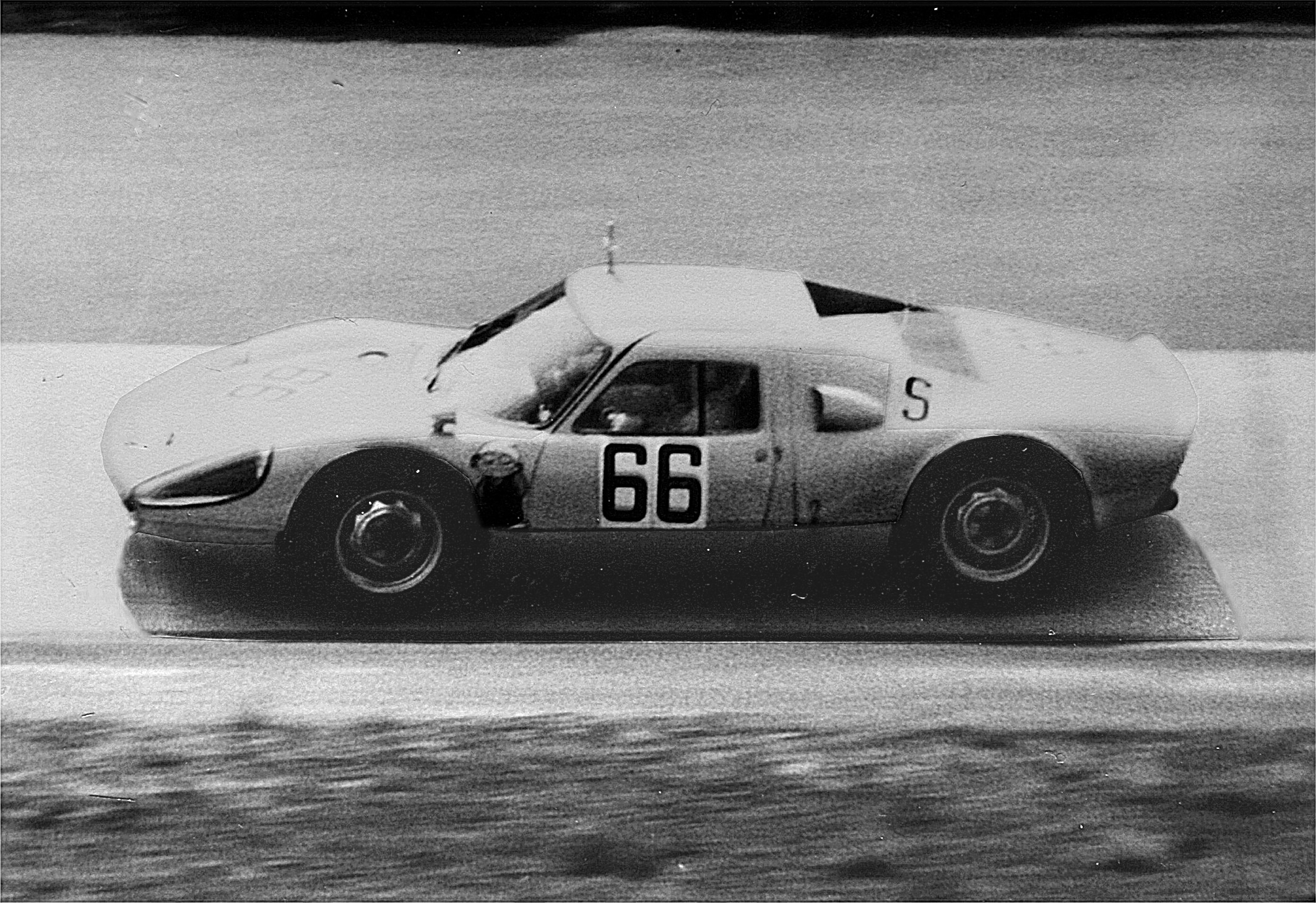 Porsche 904 im Karussell des Nürburgrings. Kamerawagen des ZDF, gefahren von Paul Frère und Rainer Günzler. Training zum 1000-km-Rennen. licence plate garbled/changed